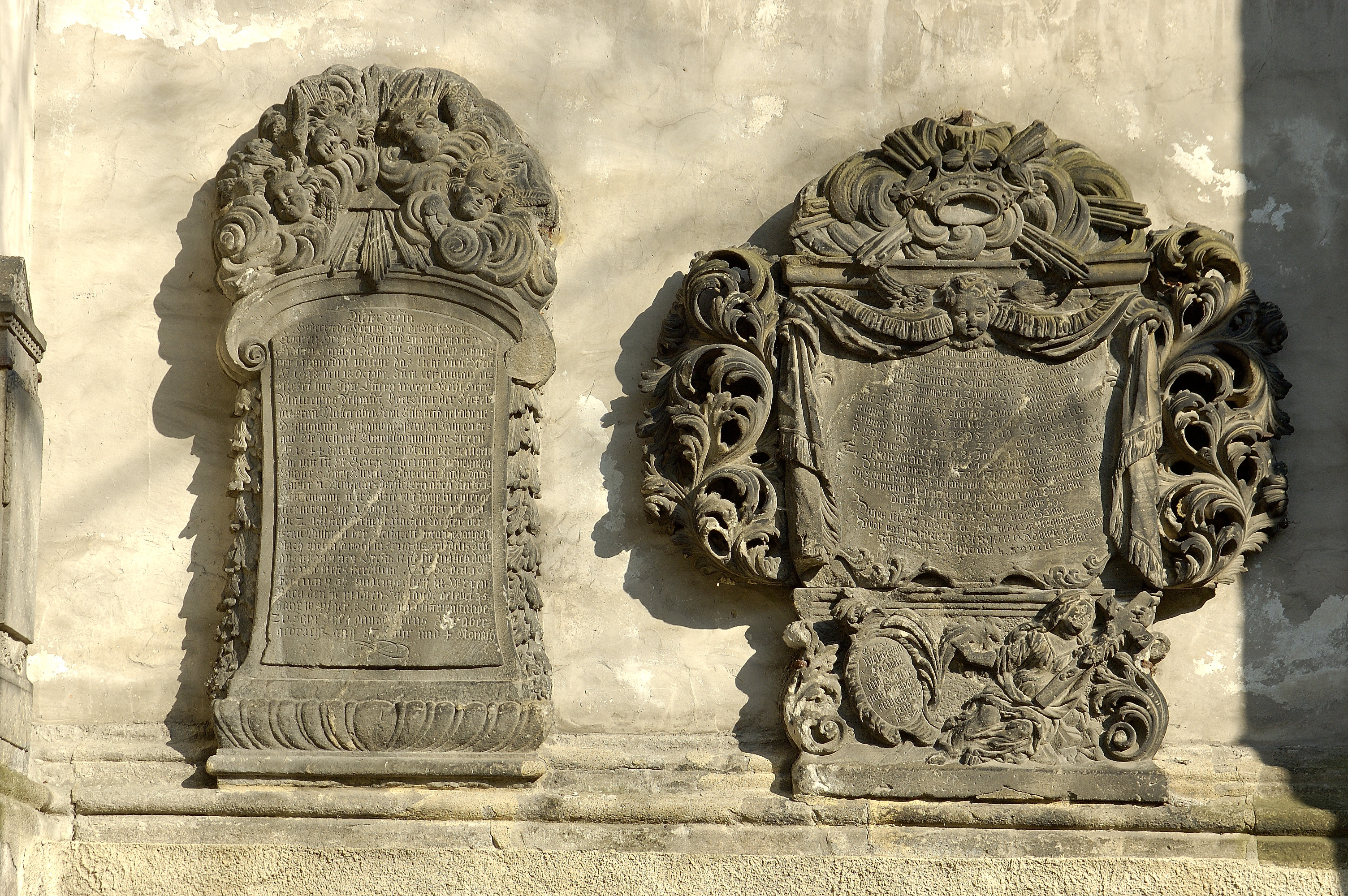 Goerlitz, Nikolaifriedhof, Epitaphe